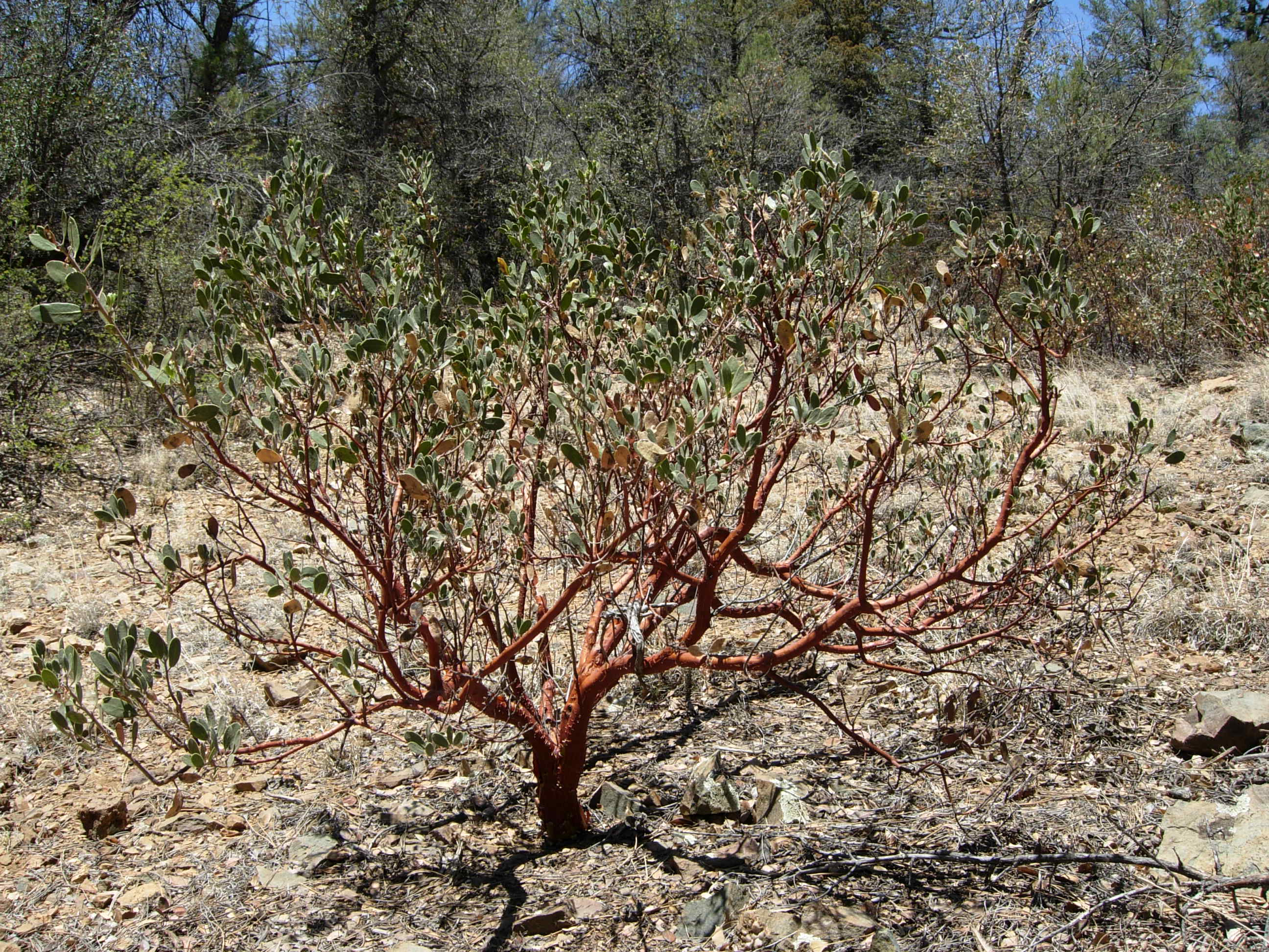 A Manzanita tree.